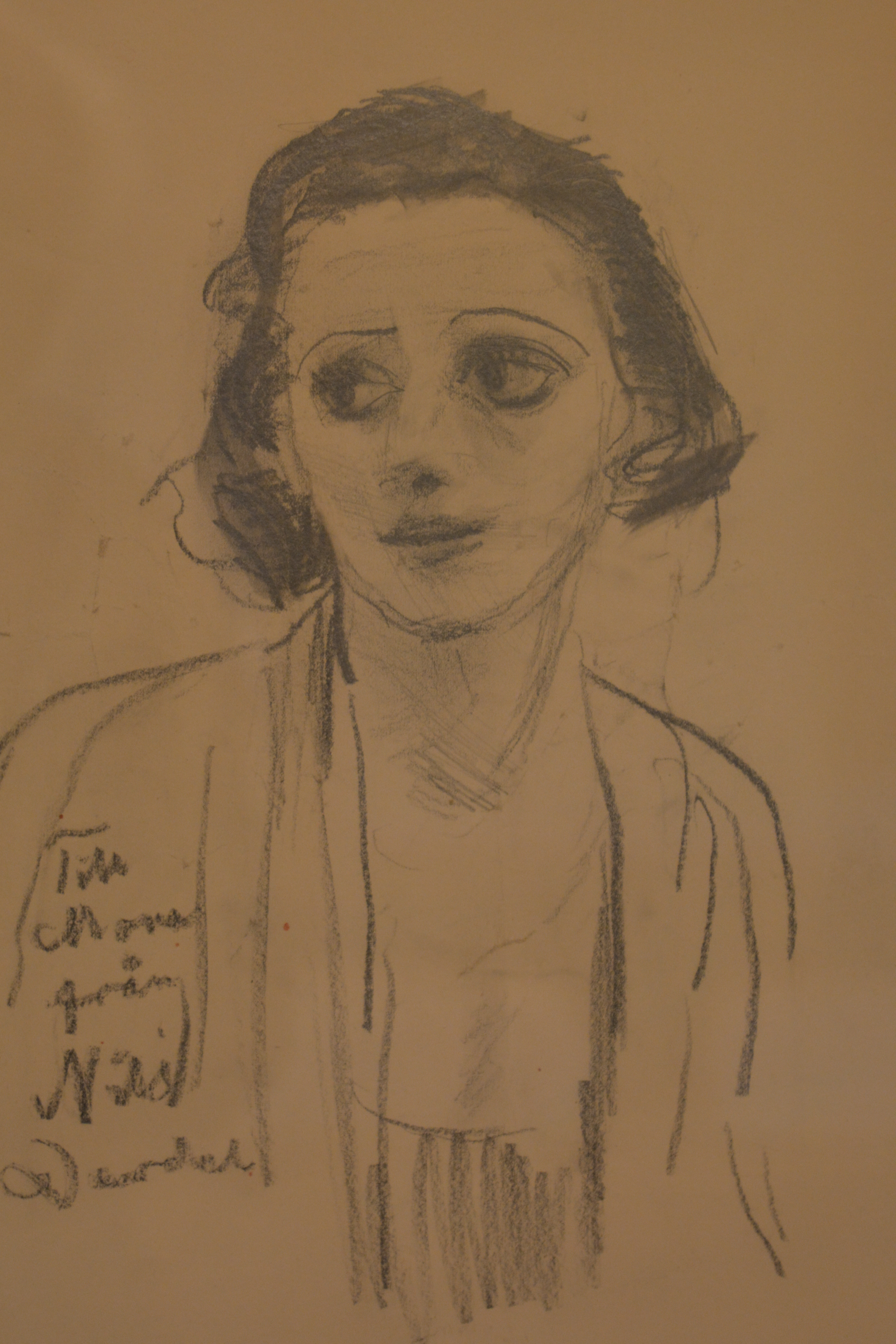 Nils Dardel: Mona Mårtensson, 1930-talet, blyerts. Finns Söderlångviks museum.